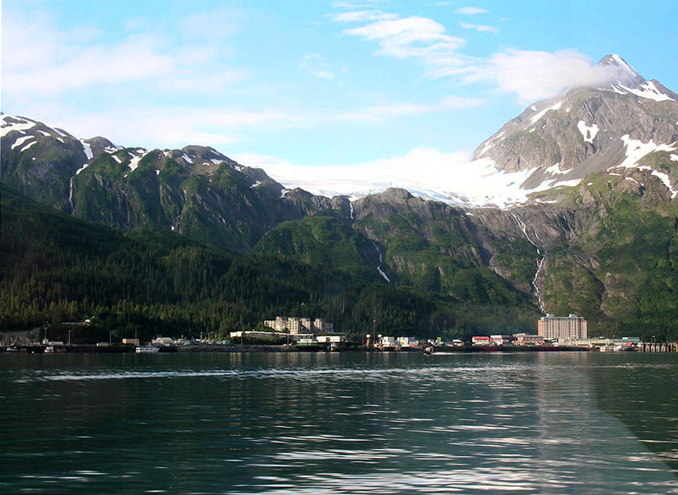 Whittier, Alaska Skyline.